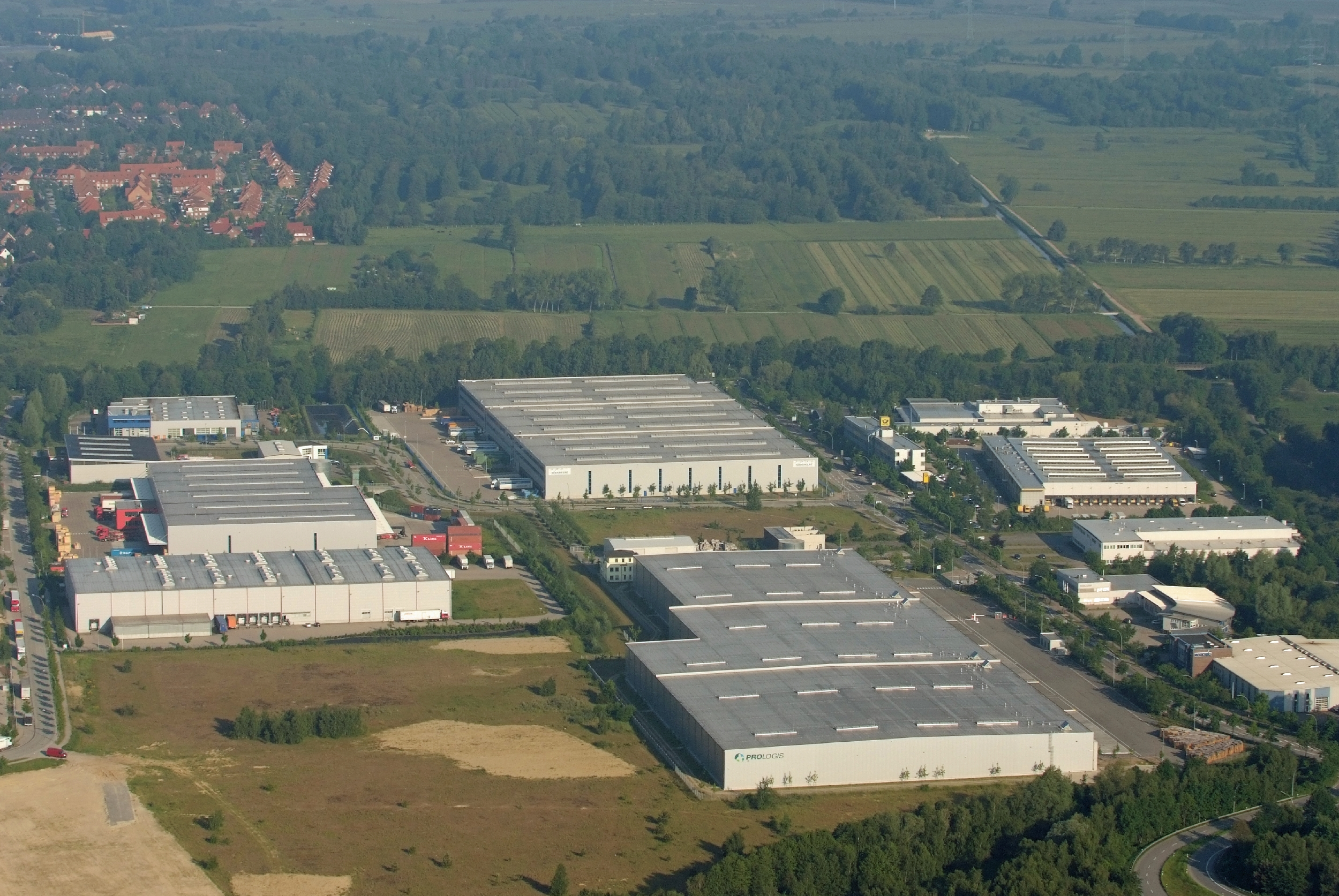 Projekt Heißluftballon Prologis